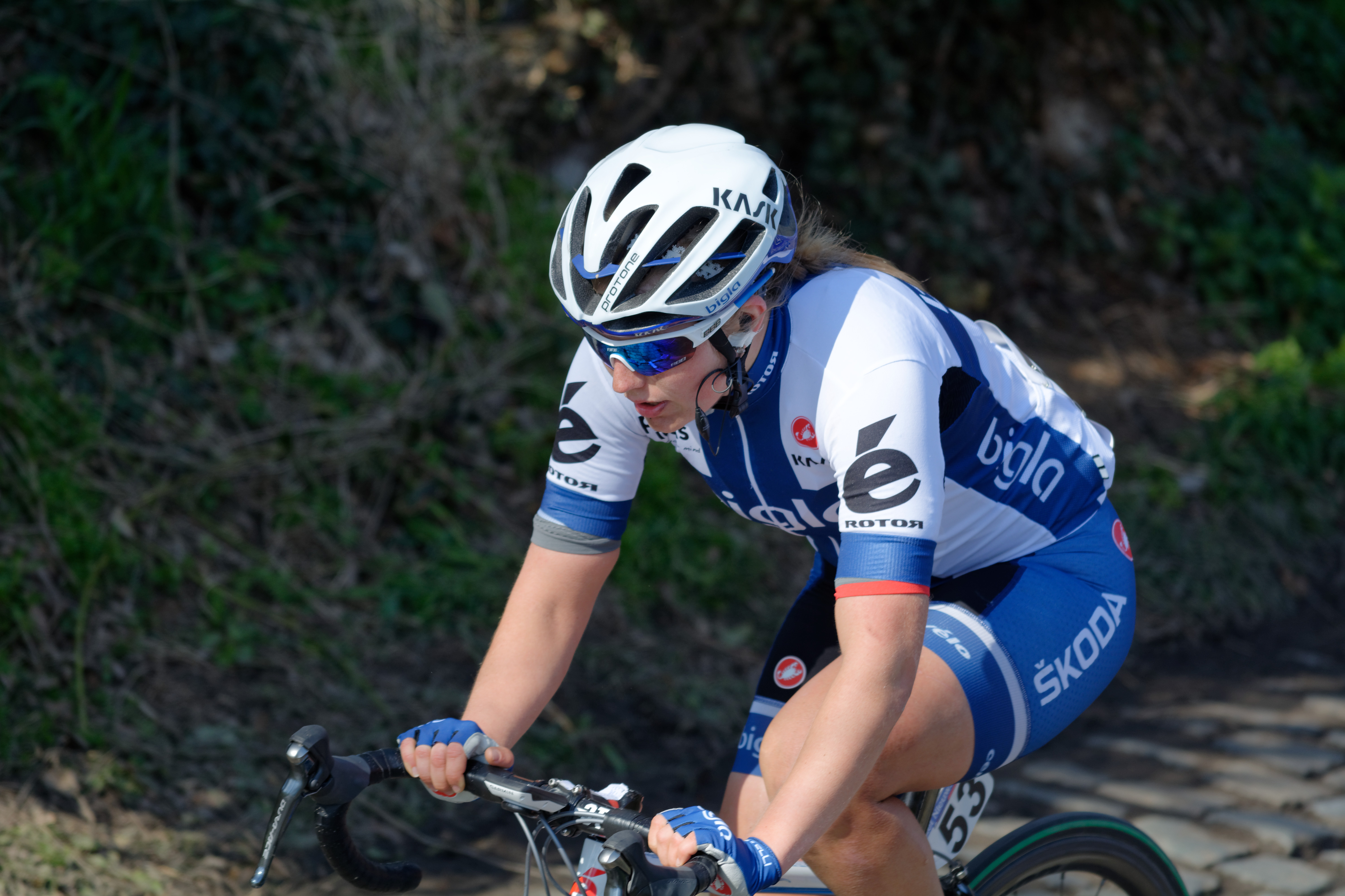 D71_6494_DxO